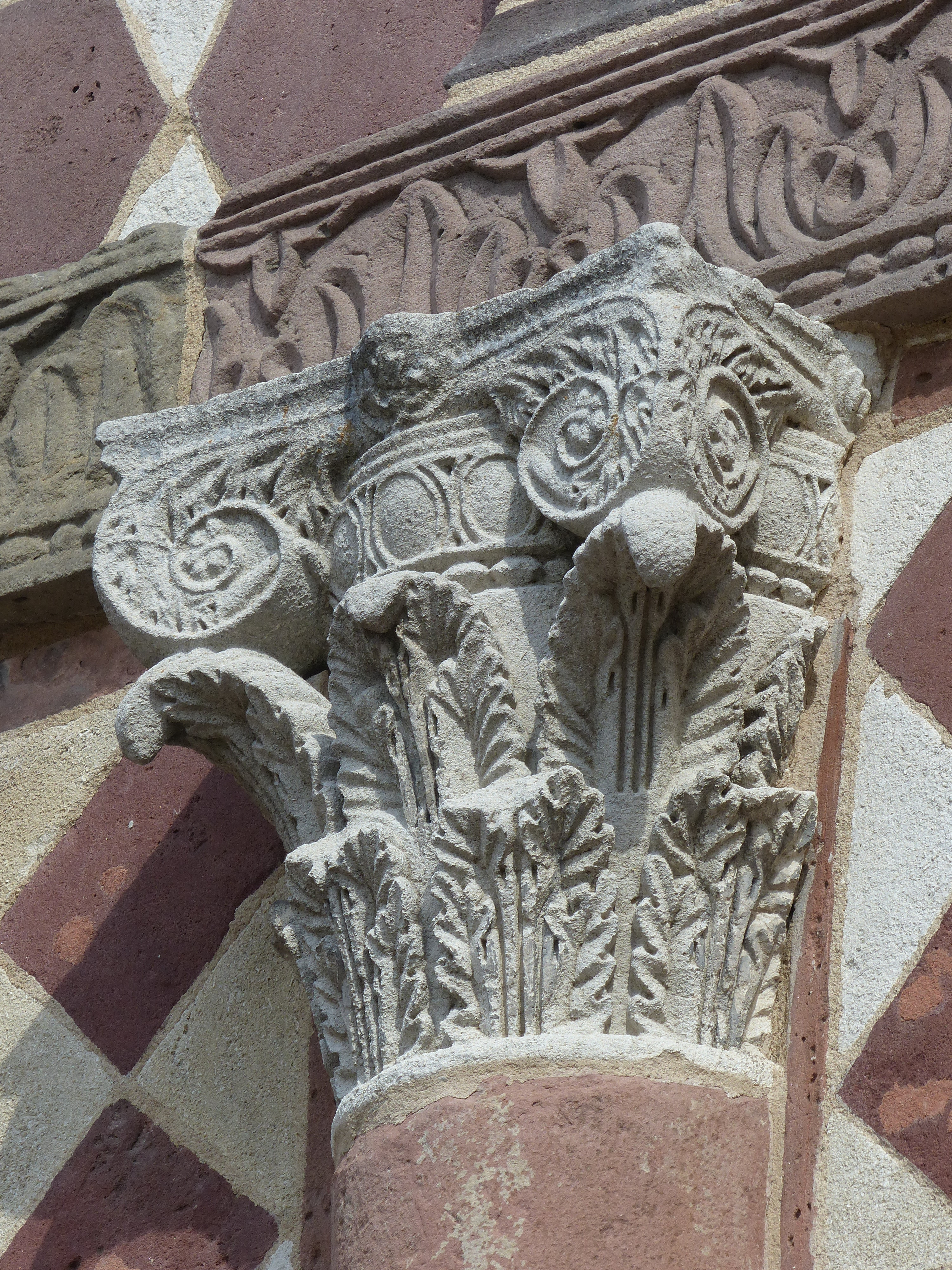 Kompositkapitell an der Außenfassade der Torhalle Lorsch